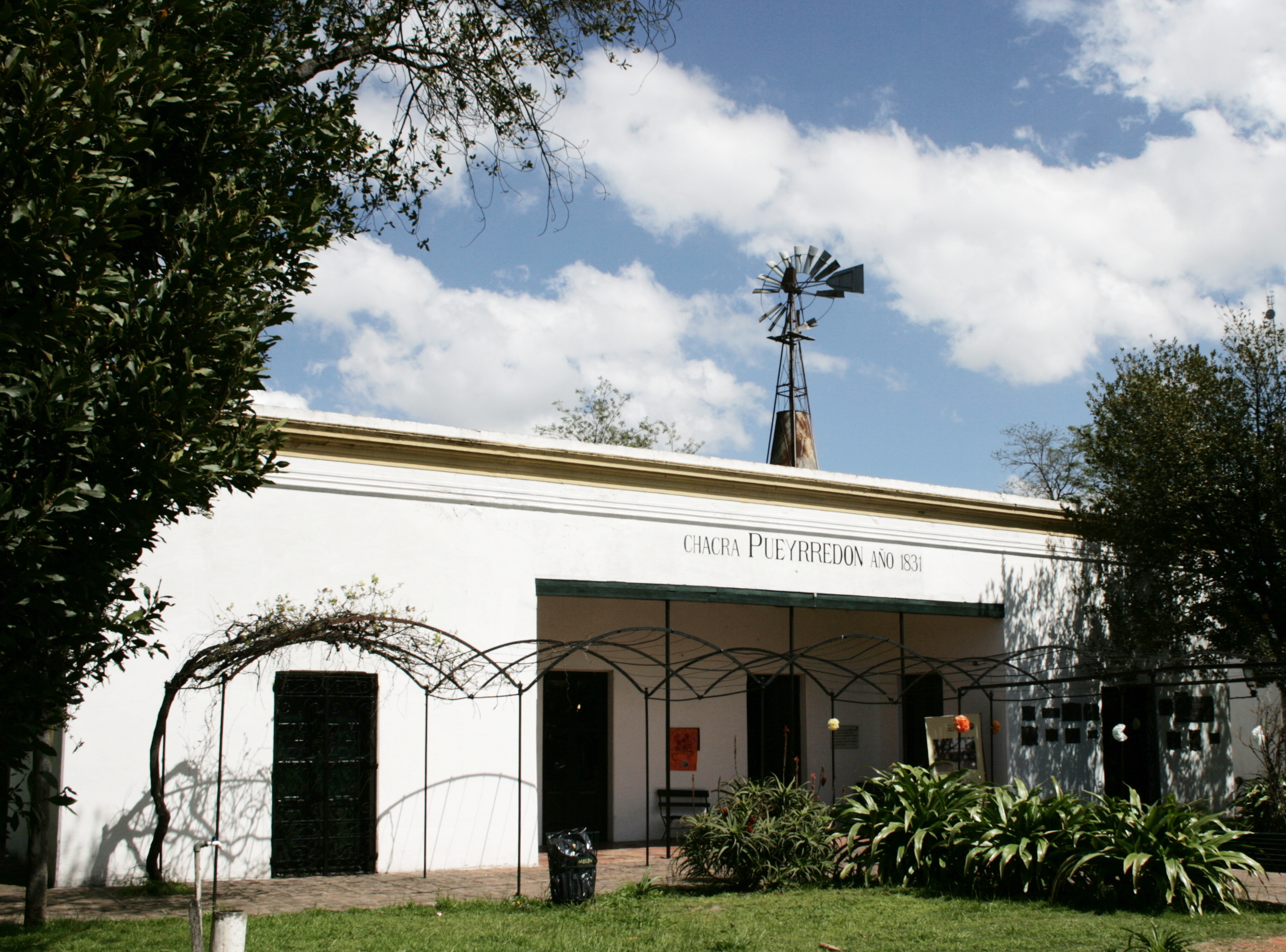 Casa natal de José Hernández, Chacra Pueyrredón